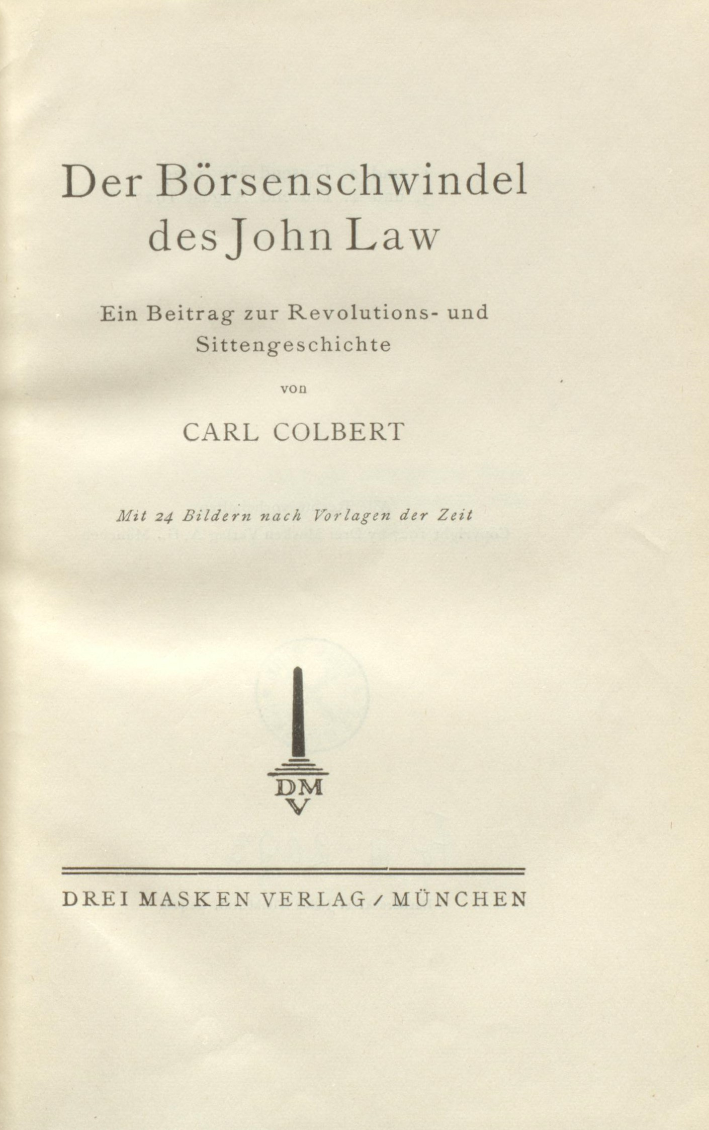 Carl Colbert John Law 1927 Titel